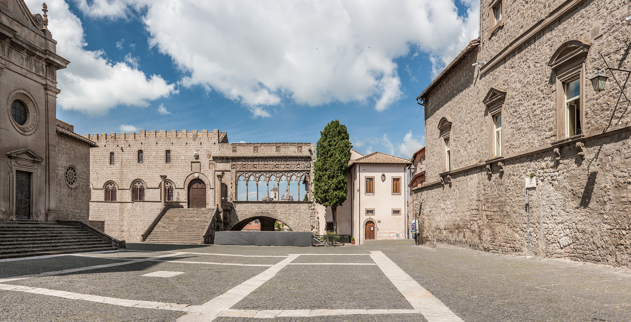 Loggia del Palazzo dei Papi (dalla Piazza di San Lorenzo)